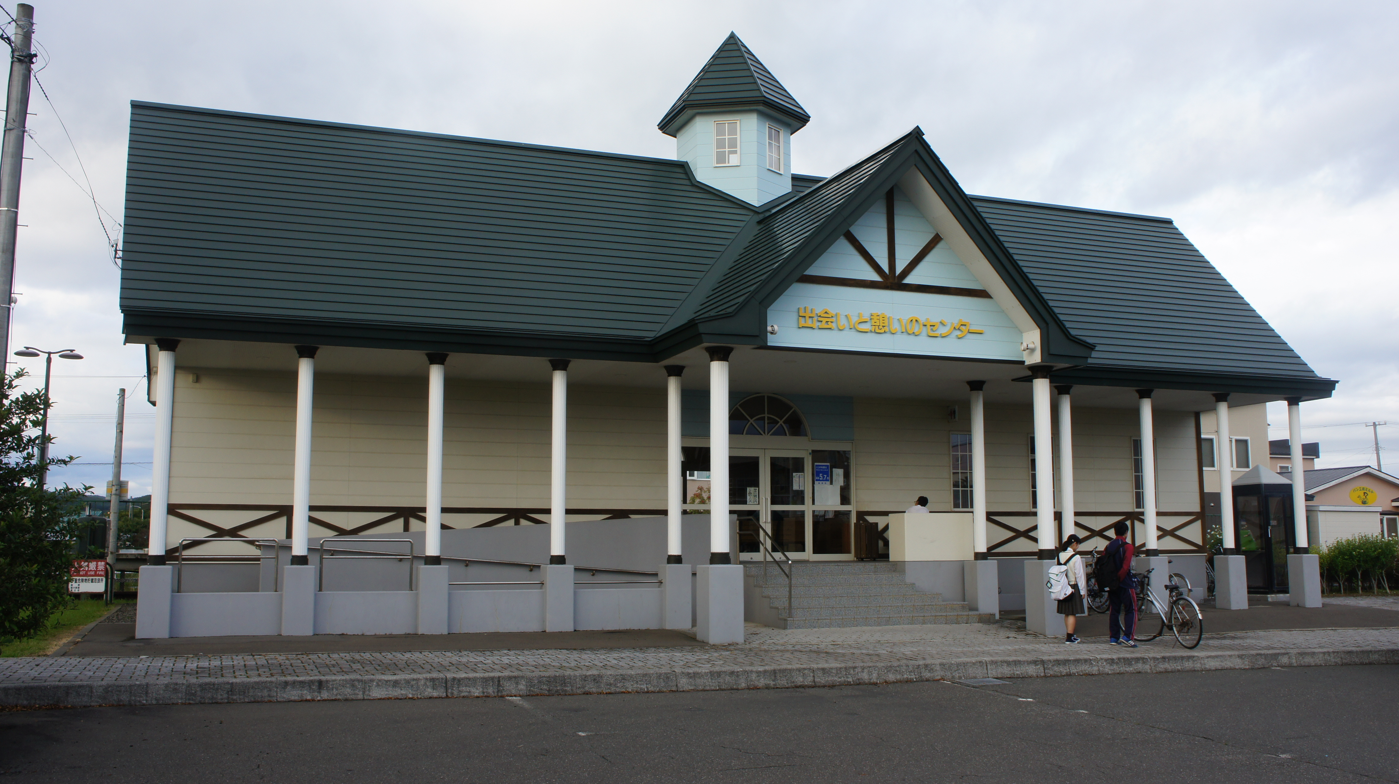 JR日高本線・新冠駅の駅舎